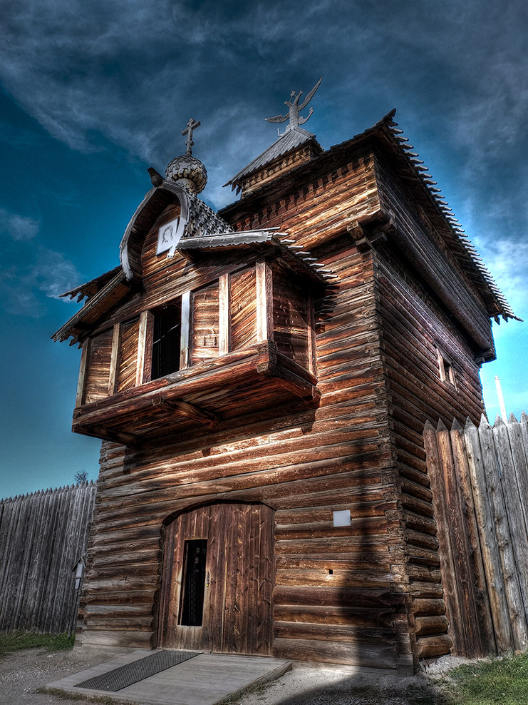 Спасская башня Илимского острога, 1667. Музей "Тальцы", 2018.